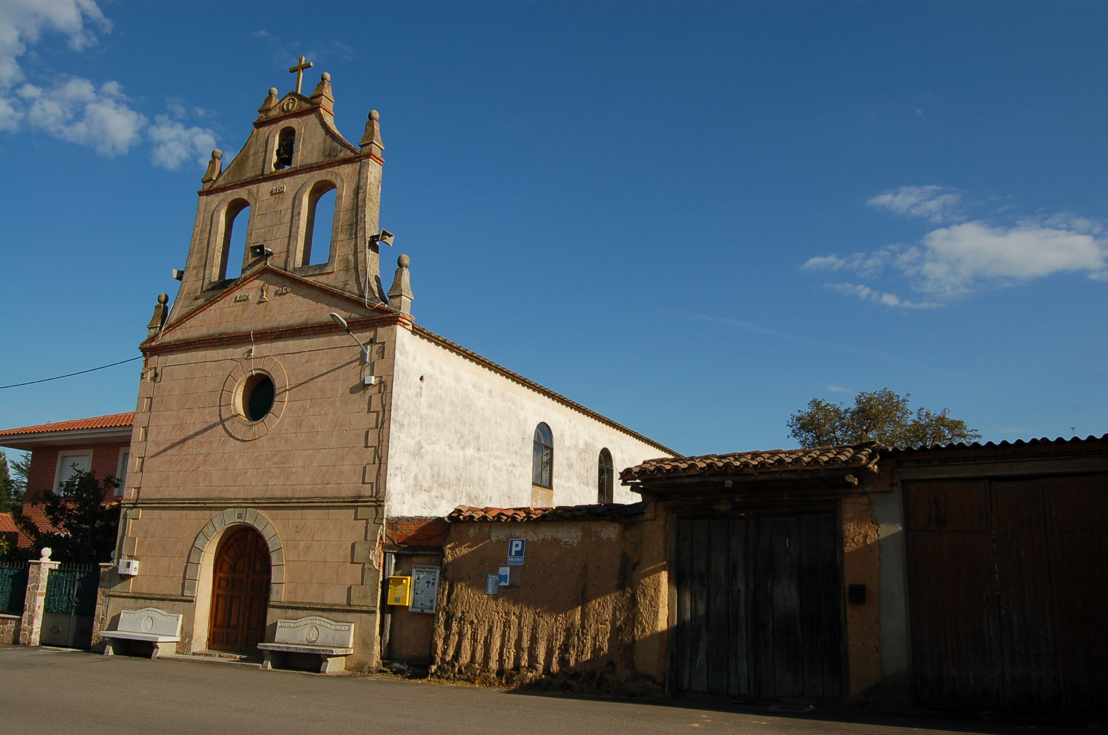 Ermida Villaveza de Valverde